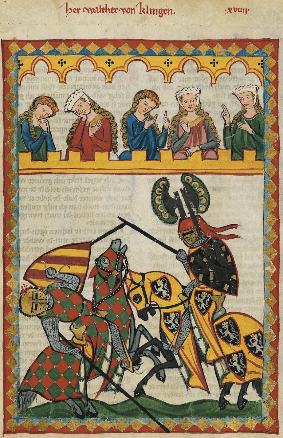 Découpage homogène de la page 52r